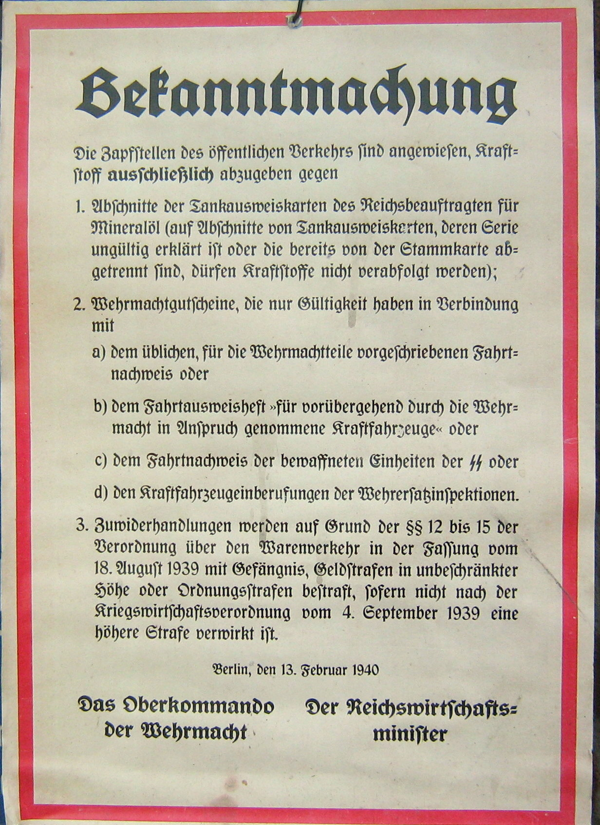 Benzin Mangel-Hinweis 1940 während des Krieges